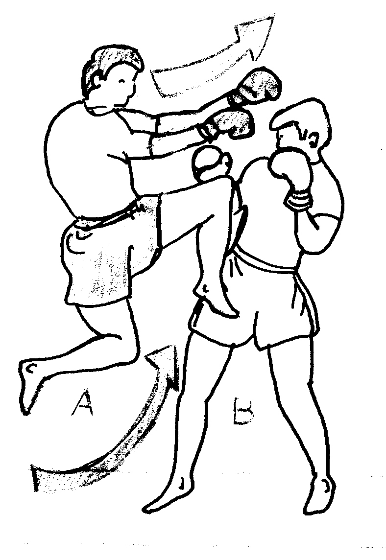 genou direct sauté1.jpg